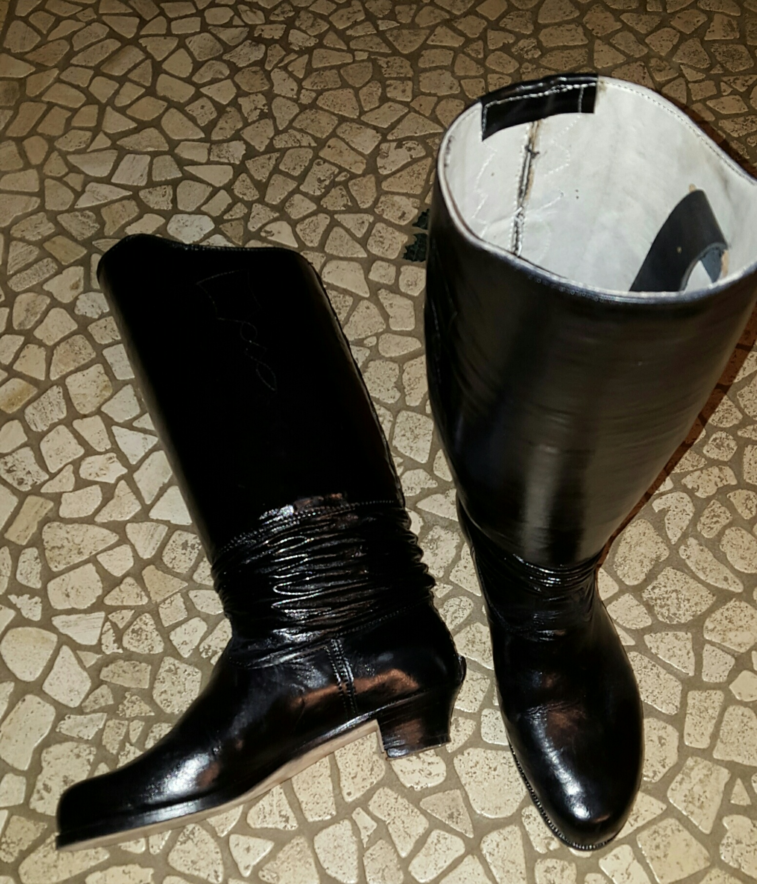 Faltenstiefel mit genagelter Sohle, geschwungenem mit Hufeisen besetztem Absatz